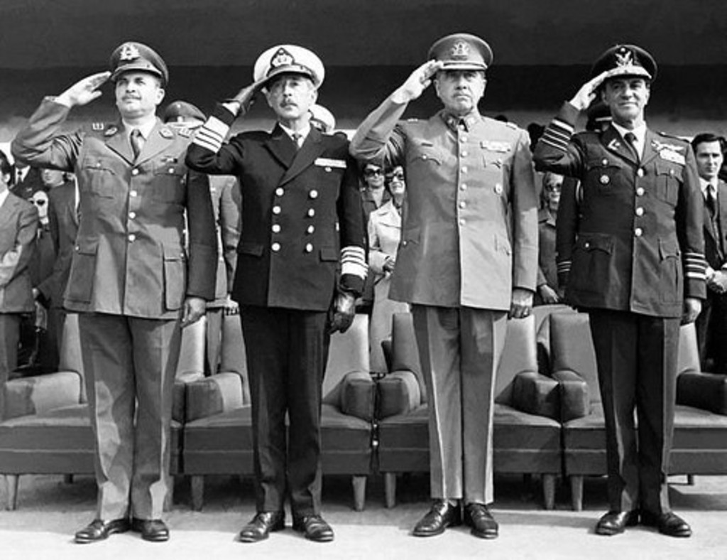 Chile. Miembros de la Junta militar que derrocó a Salvador Allende el 11 de septiembre de 1973. de izquierda a derecha: César Mendoza, director general de Carabineros; José Toribio Merino, comandante en jefe de la Armada; Augusto Pinochet, comandante en jefe del Ejército y Gustavo Leigh Guzmán, comandante en jefe de la Fuerza Aérea.